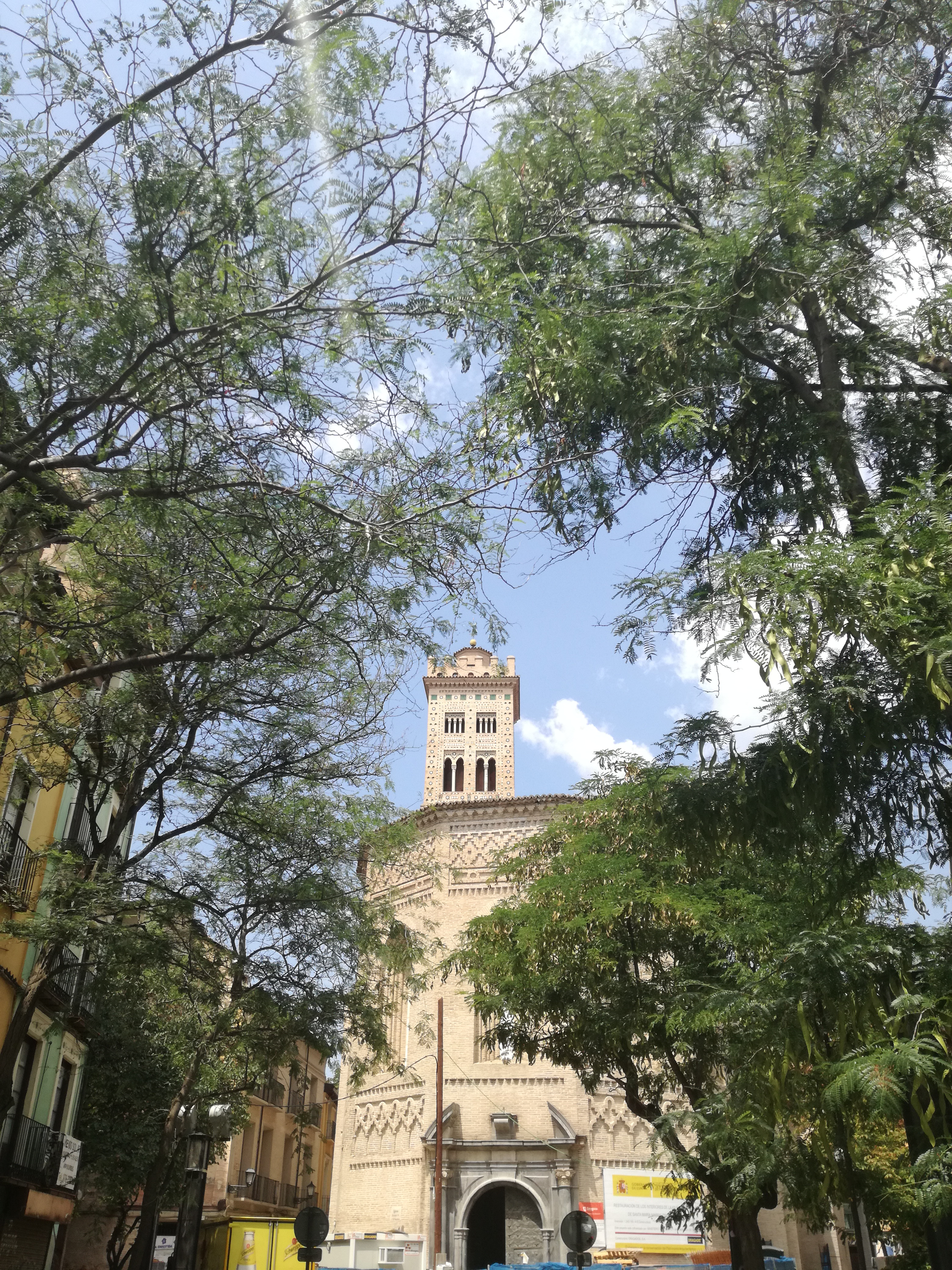 Chiesa della Maddalena